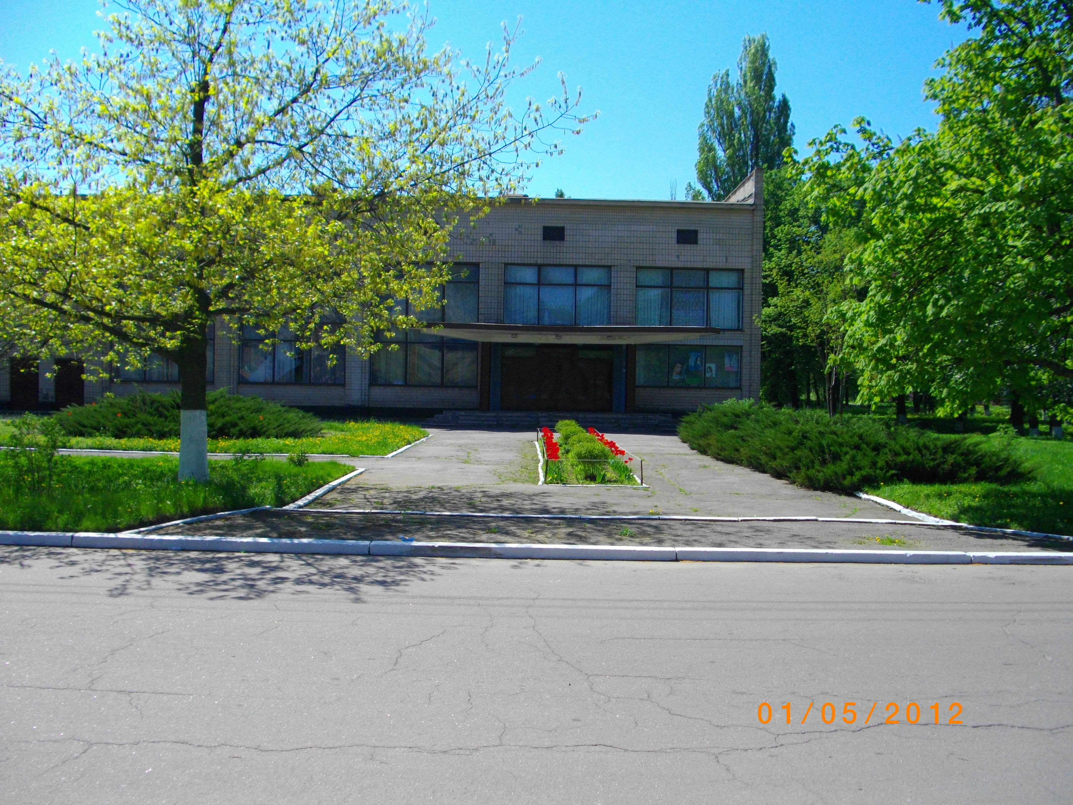 Клуб, кинотеатр